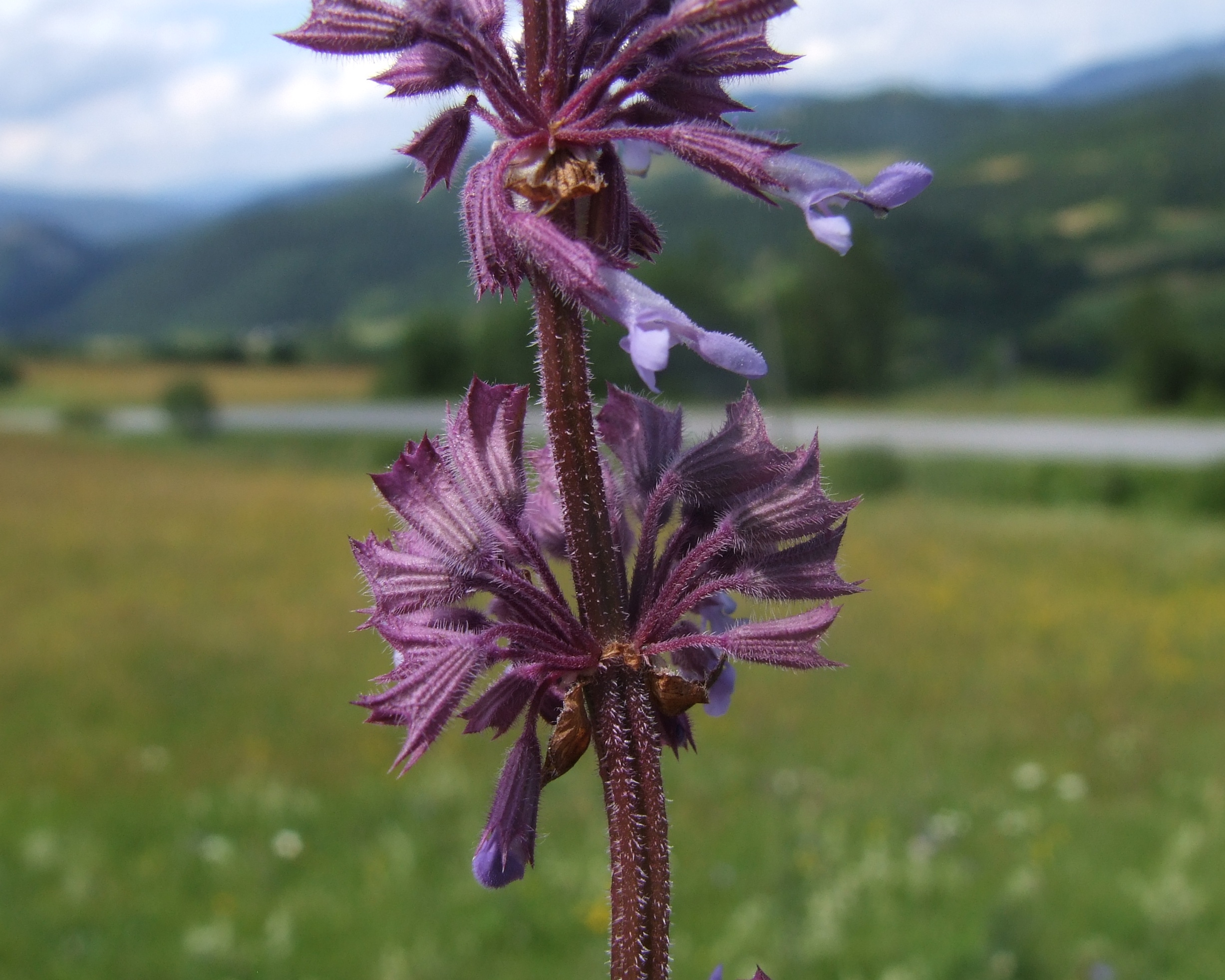 Salvia verticillata